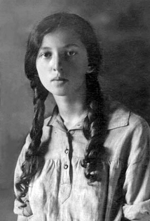 Переводчик Нора Галь в возрасте 15 лет. Июль 1927